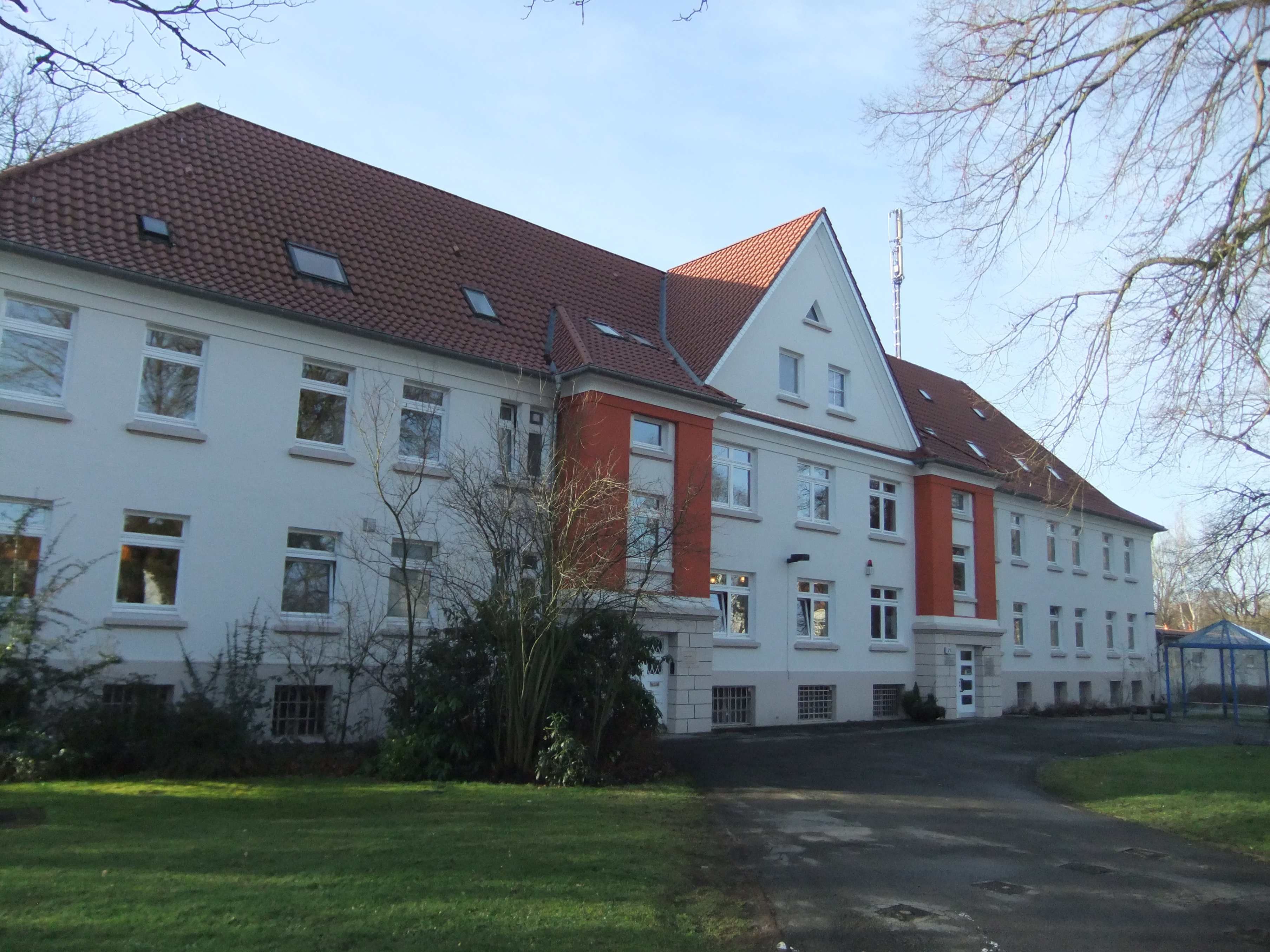 Eckardtsheim. Treffpunkt der von Bodelschwingh'schen Anstalten Bethel in Bielefeld.